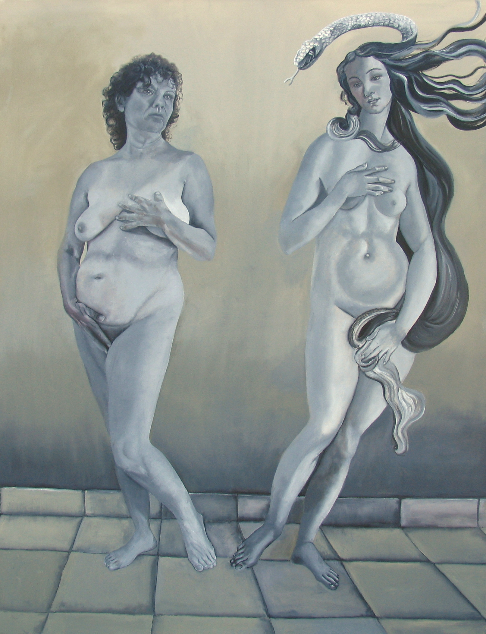 Venus and you, 180x160 cm, oil on canvas, 2008, by Ora Ruven, Israel